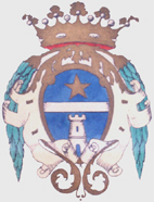 Arma Gentilizia dei Patrizi Veneti Toderini